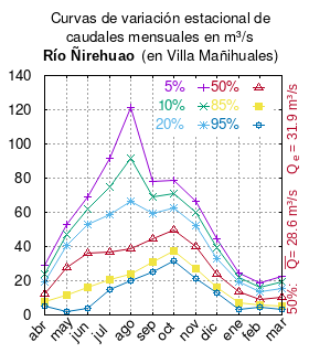 Curvas de variación estacional del río # Dirección General de Aguas # Diagnóstico y clasificación de los cursos y cuerpos de agua según objetivos de calidad. Cuenca del río Aysén. # Santiago de Chile # Ministerio de Obras Públicas (Chile) # 2004 # url: # urlarchivo: # Tabla 4.1: Estación Ñirehuao en Villa Mañihuales, pág. 48 mes 5% 10% 20% 50% 85% 95% abr 28.90 24.04 19.23 12.55 7.42 5.45 may 52.86 47.26 40.47 27.49 11.51 2.12 jun 69.05 61.84 53.10 36.41 15.84 3.76 jul 91.56 74.89 58.71 36.87 20.79 14.85 ago 121.28 91.72 66.60 38.92 23.92 19.76 sep 78.15 69.00 59.35 44.50 31.21 25.34 oct 78.62 71.03 62.82 49.66 37.18 31.37 nov 66.48 59.94 52.48 39.87 27.33 21.41 dic 44.75 39.06 33.13 24.18 16.41 13.07 ene 24.41 22.04 19.17 13.69 6.94 2.98 feb 18.62 15.99 13.30 9.35 6.06 4.69 mar 22.53 19.10 15.52 10.12 5.32 3.15 This plot was created with Gnuplot.